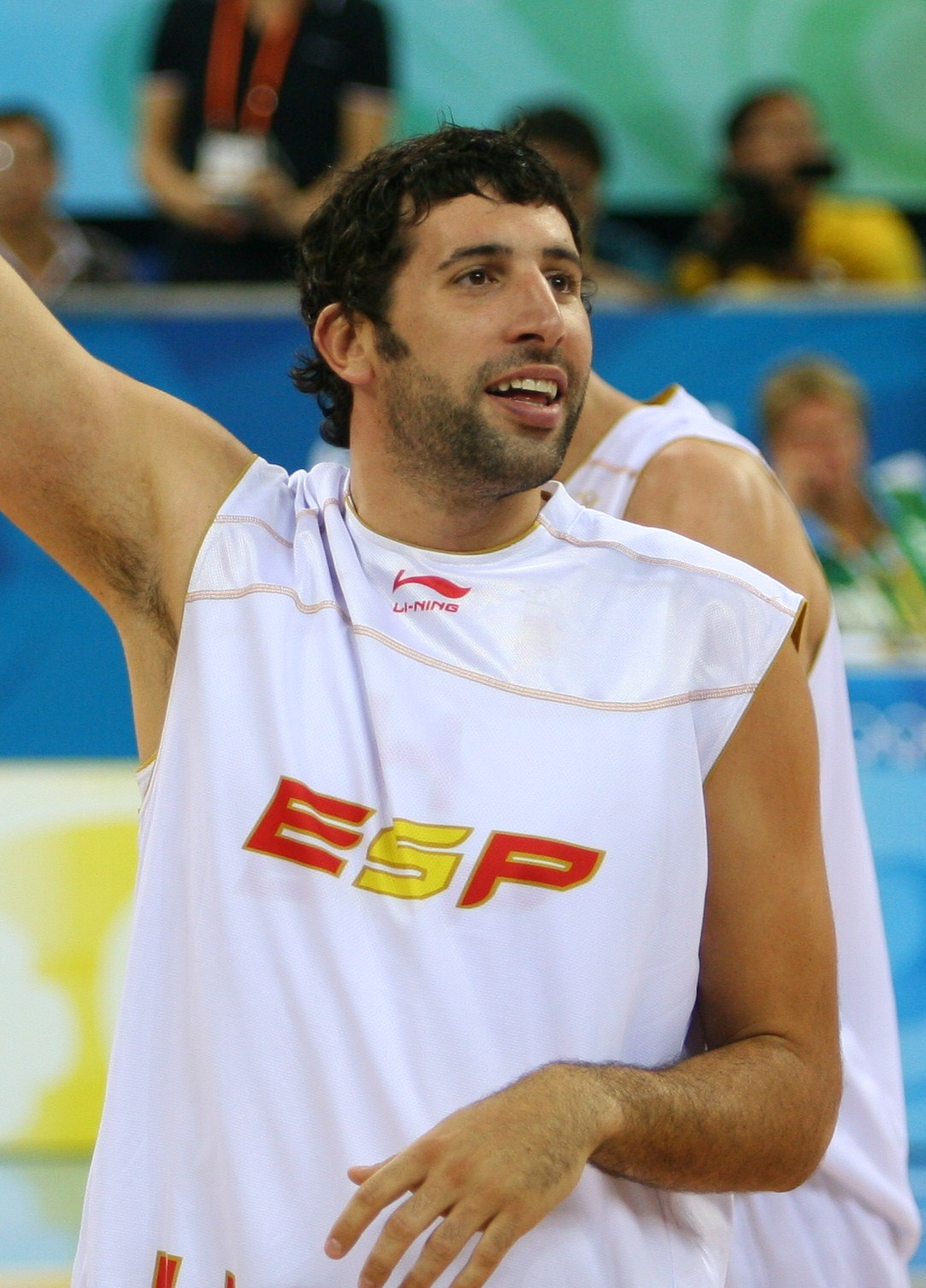 El jugador de la selección española de baloncesto Álex Mumbrú. Semifinales de los J.J.O.O. Beijing 2008.